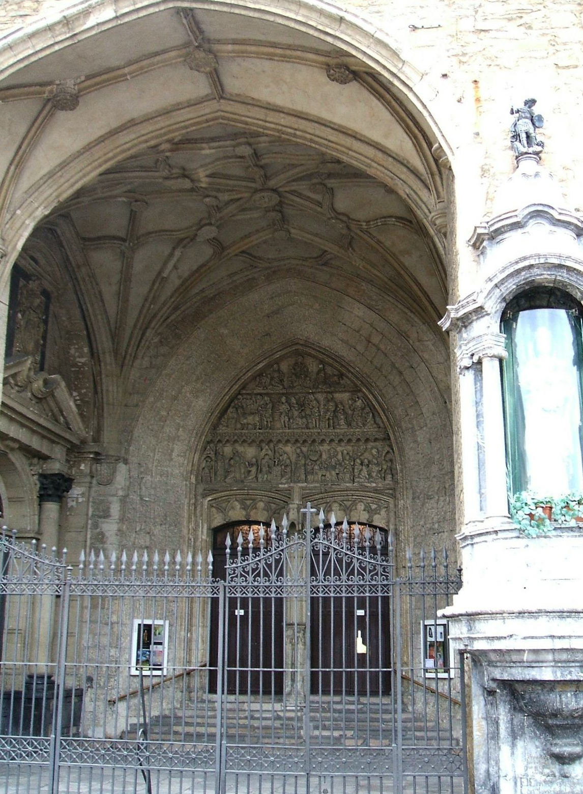 Pórtico de la iglesia de San Miguel, Vitoria-Gasteiz